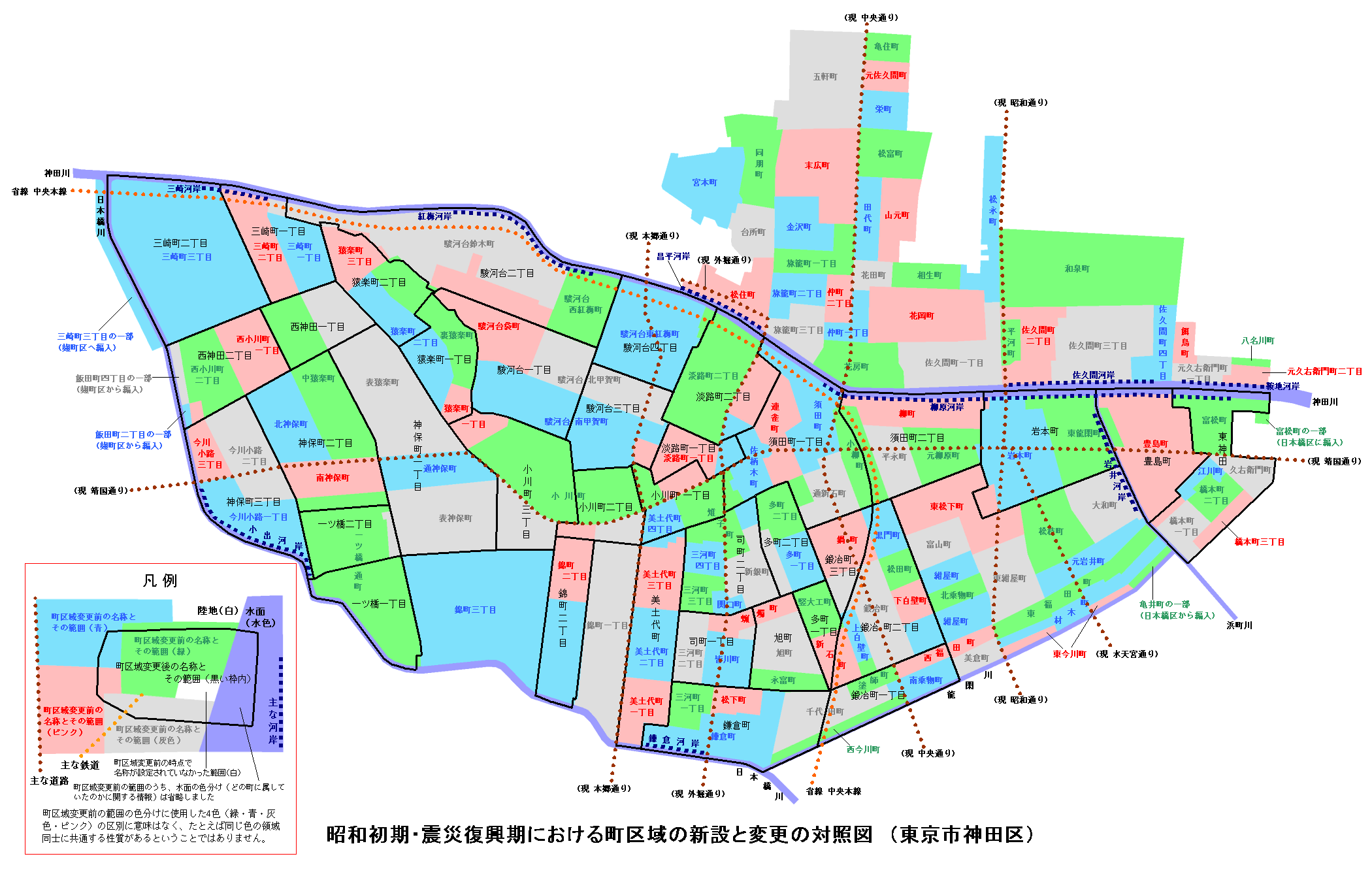 昭和初期・震災復興期における町区域の新設と変更の対照図 東京市神田区